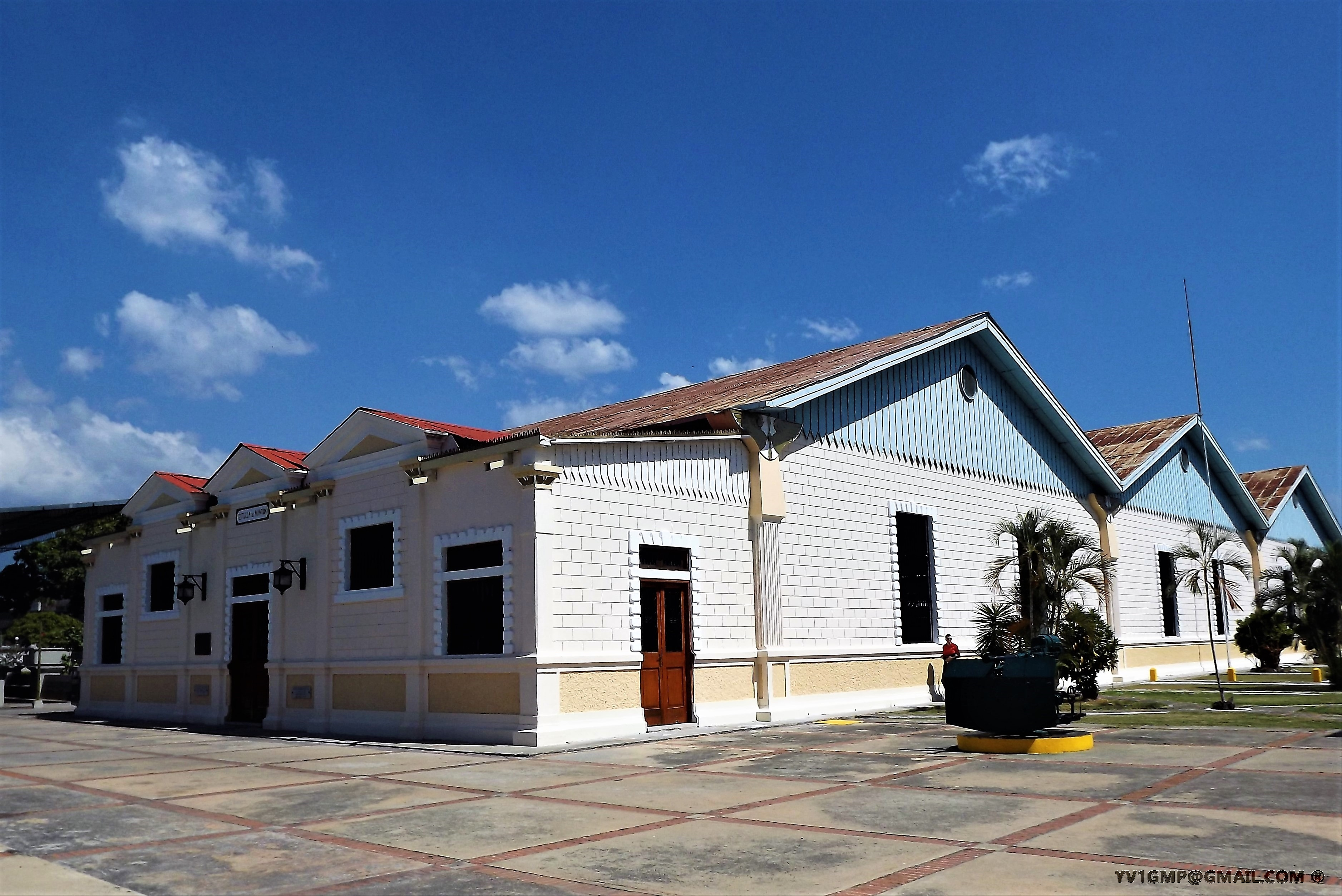 Patrimonio Histórico de Venezuela, cuna de la aviación Venezolana.